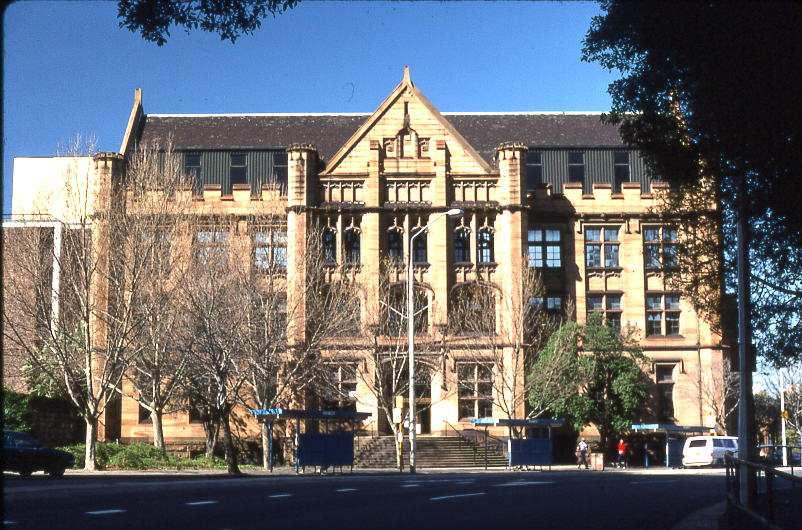 Registrar-General's Building, Sydney (Walter Liberty Vernon)